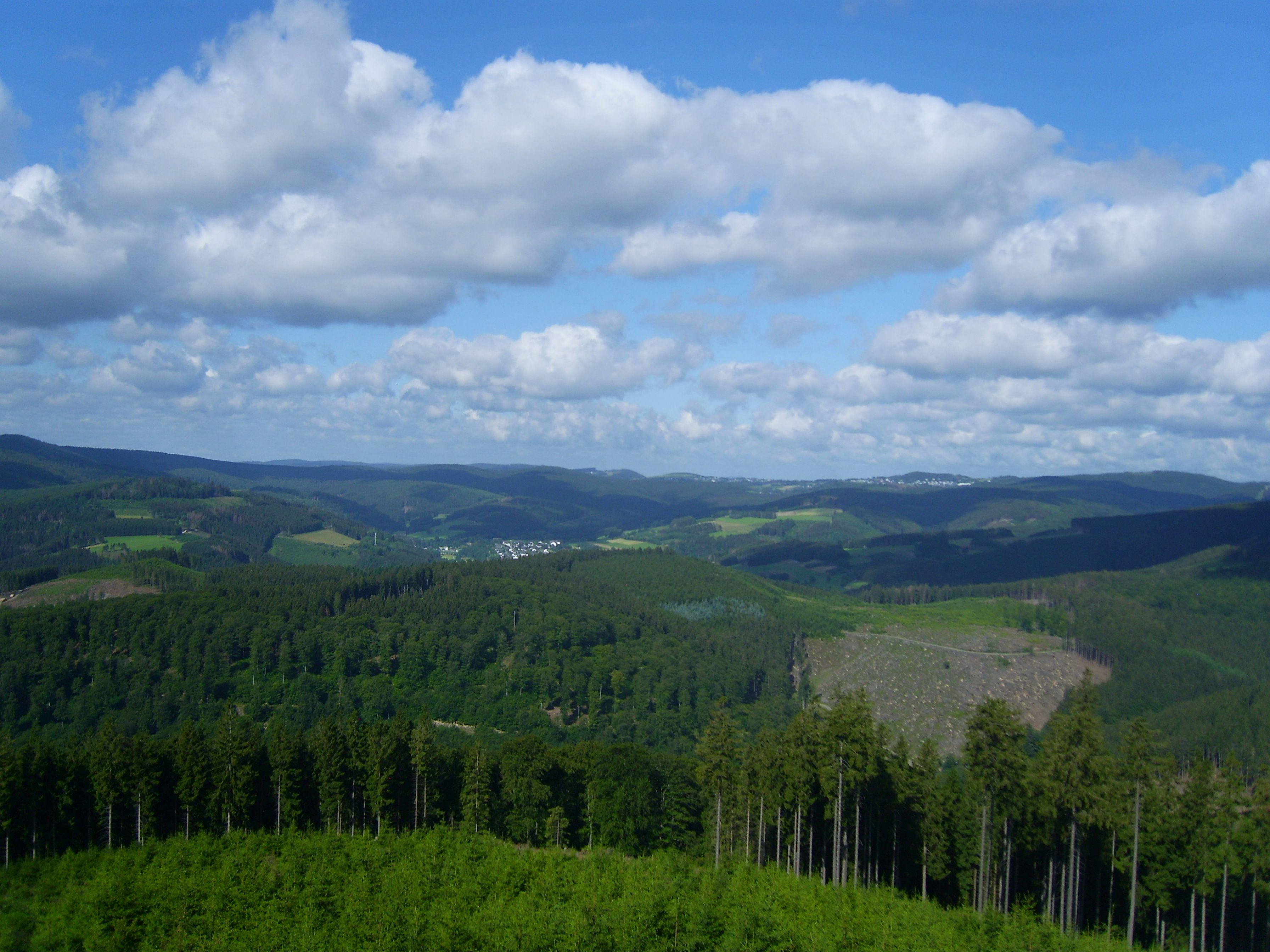 Blick vom Bollerbergturm (758 m; Naturraum 333.7 Hohe Seite) auf Ziegenhelle und Asten, ein paar markantere Gipfel/Berge von links nach rechts: Ziegenhelle (816,1 m; 333.51 Naturraum Ziegenhele) Hackelberg (690,5 m; 3,6 km) Großer Kopf (741 m; 19,5 km; 333.52 Kühhuder Rothaar) Hohe Hessel (743 m; 28,4 km; 333.41 Rüsper Rothaar) Albrechtsberg (771 m; 14,2 km; Kühhuder Rothaar), davor der Zwistberg (647 m; 8,9 km; Ziegenhelle), davor Züschen| die Langewiese (333.53) mit Langewiese und Neuastenberg Gerkenstein (793 m; 9,1 km; Langewiese bzw. 333.54 Astenberg) Kahler Asten (842 m; 8,8 km; Langewiese bzw. Astenberg) – siehe Udeuschle